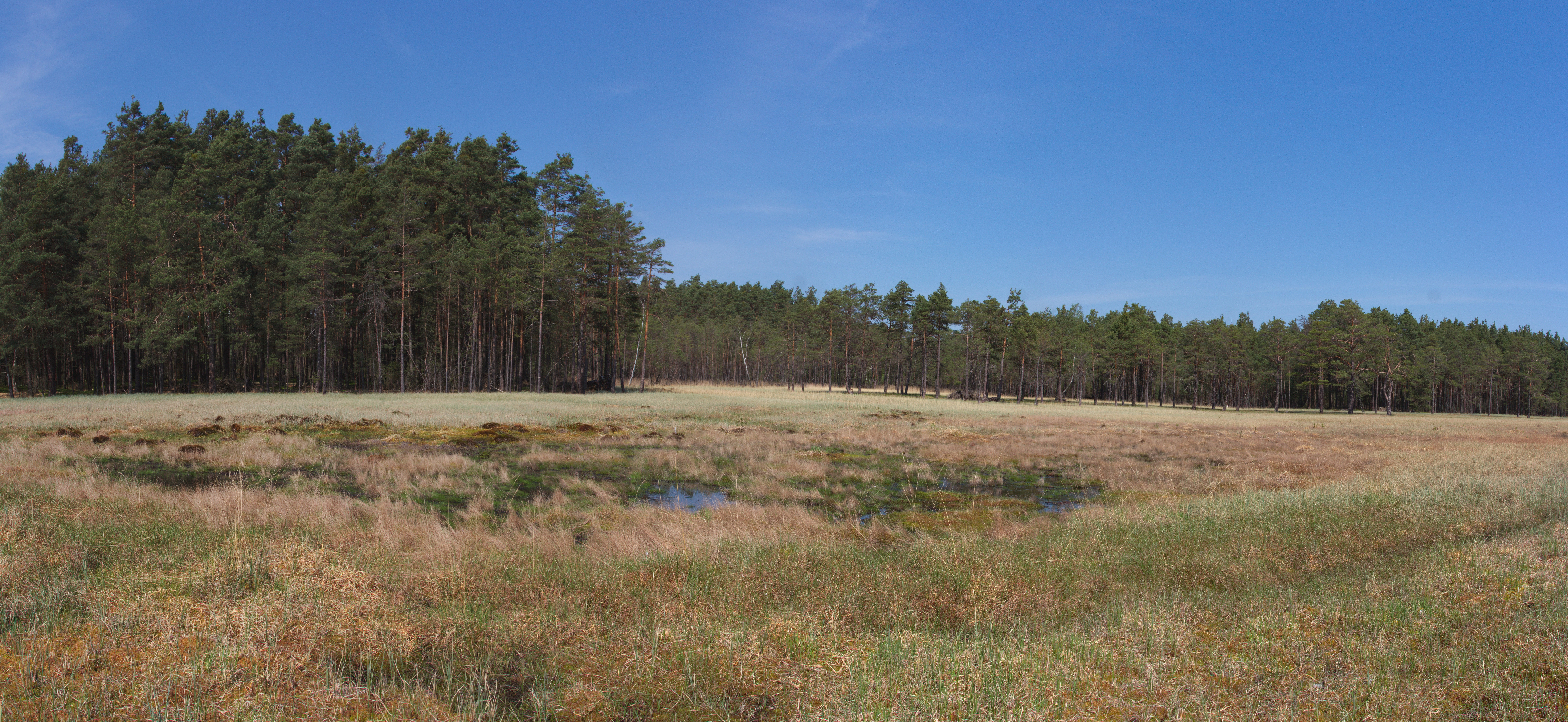 Dvořiště (přírodní rezervace) - rašeliniště